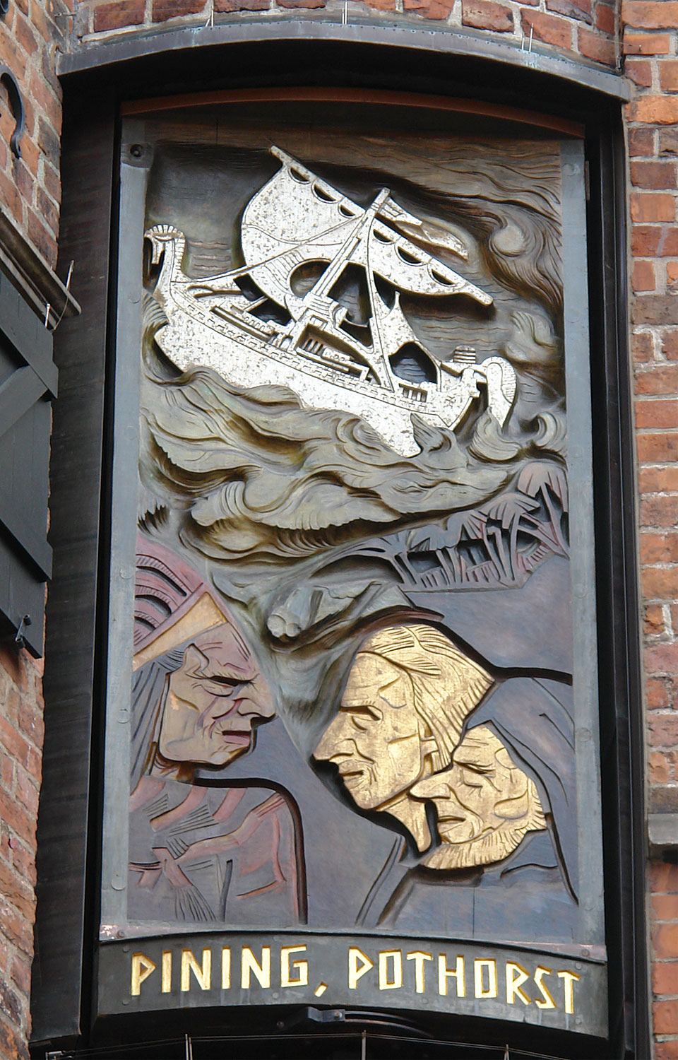 Bernhard Hoetger: Dietrich Pining und Hans Pothorst (1934, Ozean-Bezwinger auf 10 Bildtafeln). Standort: Haus des Glockenspiels in der Böttcherstraße, Bremen